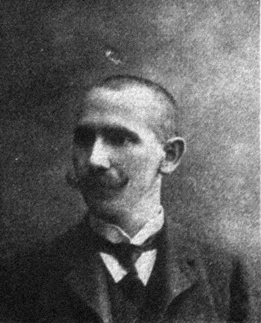 Österreichischer Politiker, Reichsratswahl 1907, Name siehe Dateiname